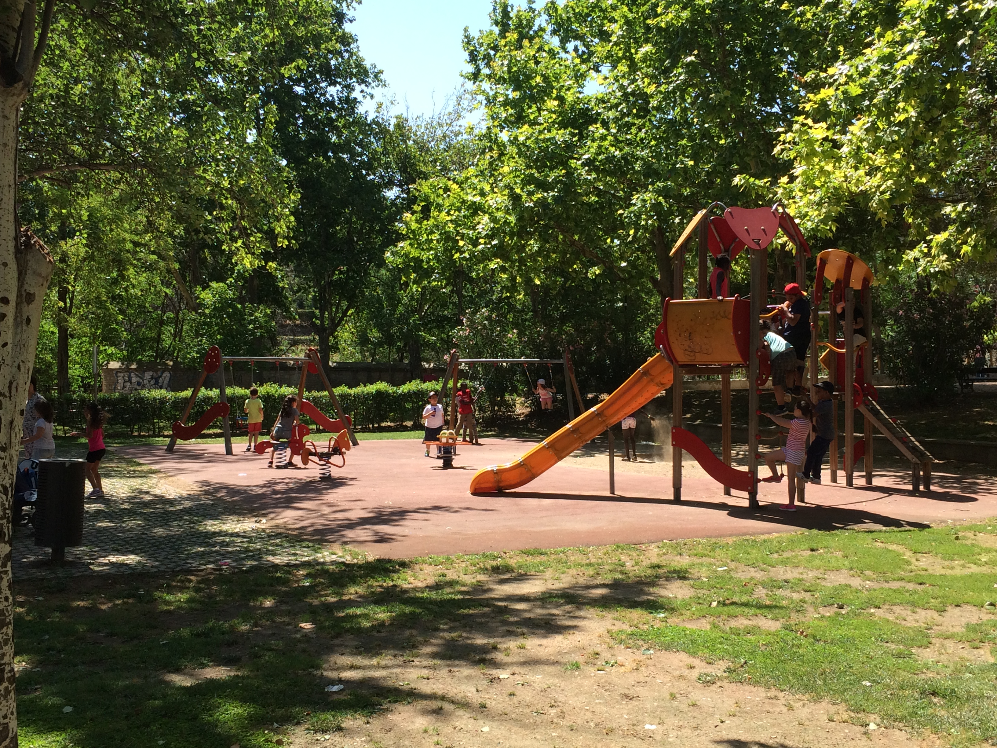 Columpios en el Parque Bruil (Zaragoza)